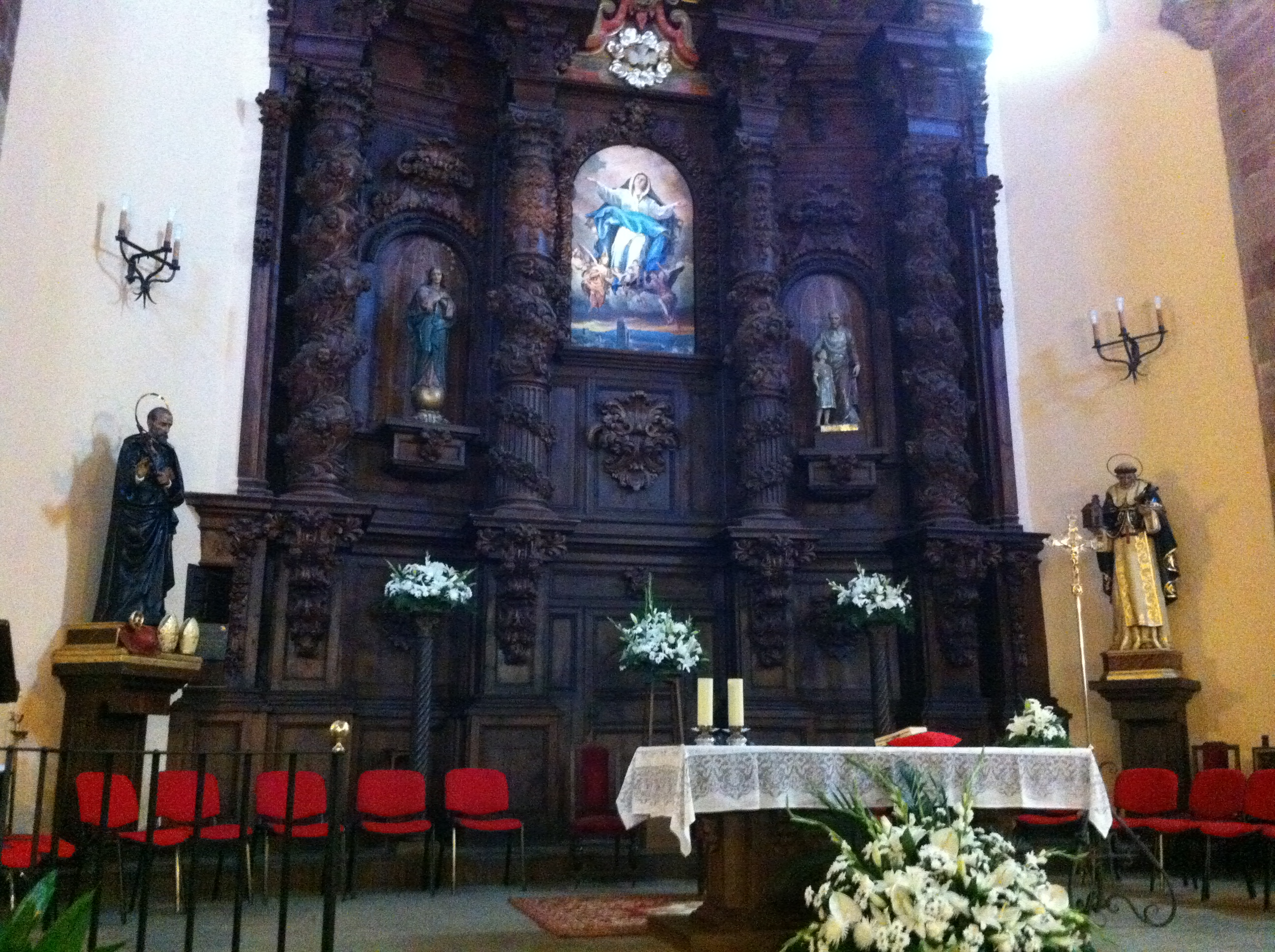 Altar, retablo e imágenes de San Juan de Ávila y San Juan Bautista de la Concepción en la parroquia de Almodóvar del Campo (Ciudad Ral)